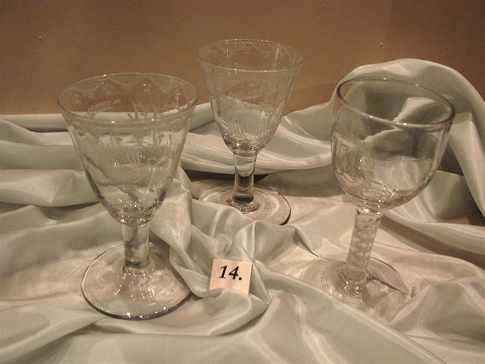 Glas fra Hurdal (a+b) i det 18. århundrede, Søndre Brekke Gård Museum, Skien, Telemark, Norge